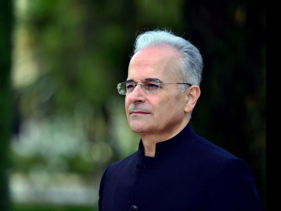 ابراهیم لطفی - موسیقی‌دان و رهبر ارکستر٬ دی ۱۳۹۷